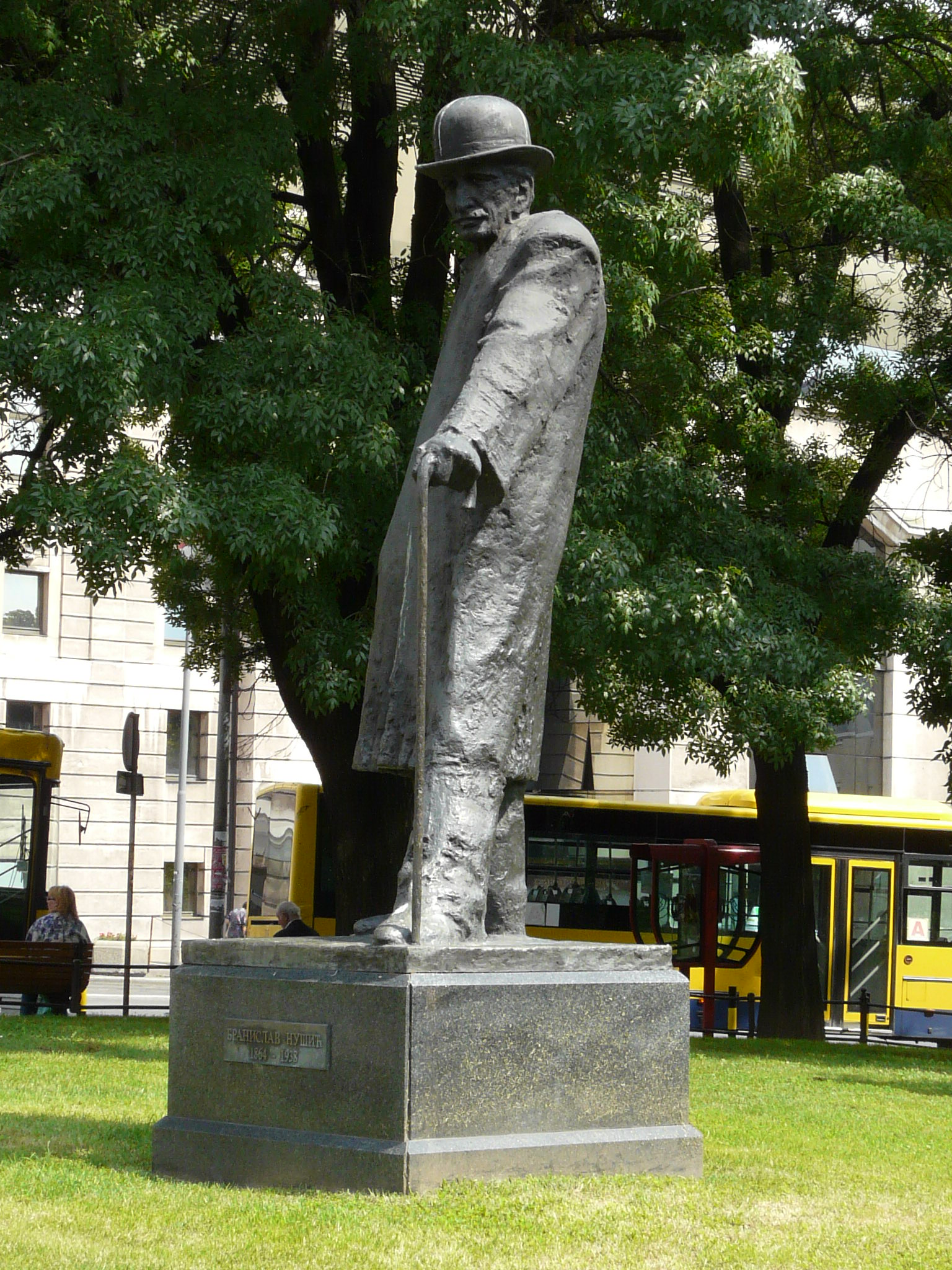 Паметник на Бранислав Нушич